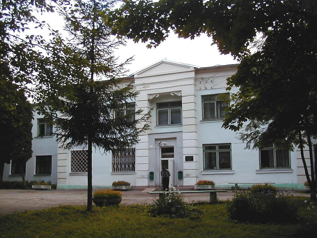 Gereņimovas muiža 2001-08-12